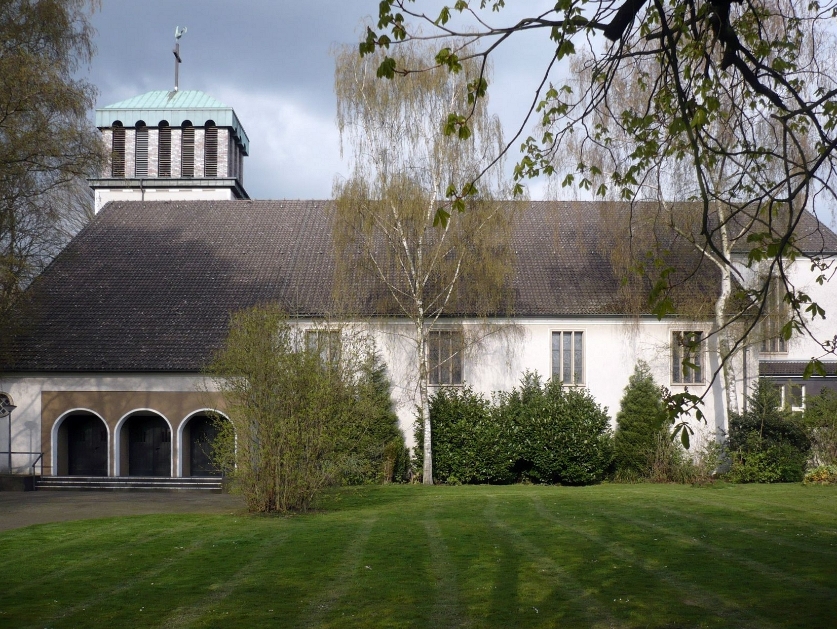 Kath. Kirche Heilige Familie in Essen-Margarethenhöhe